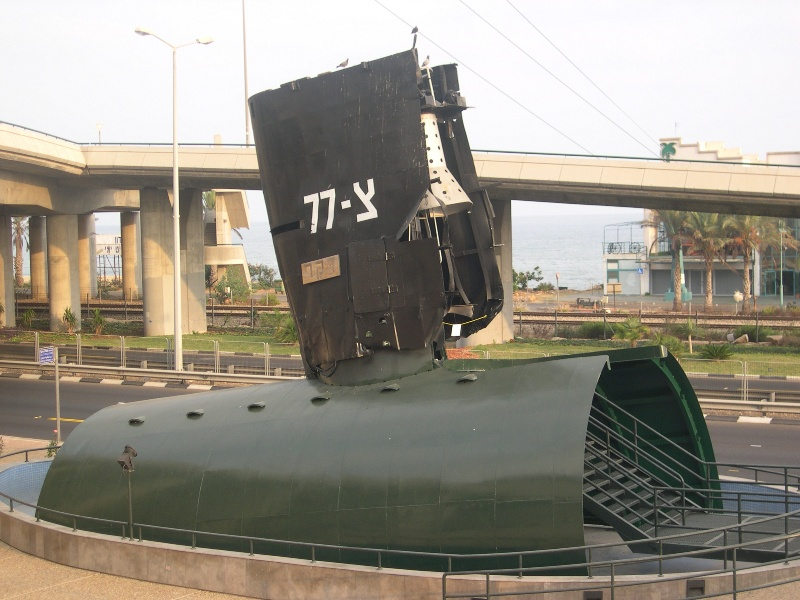 HN-INS Dakar, אח"י דקר, צ-77